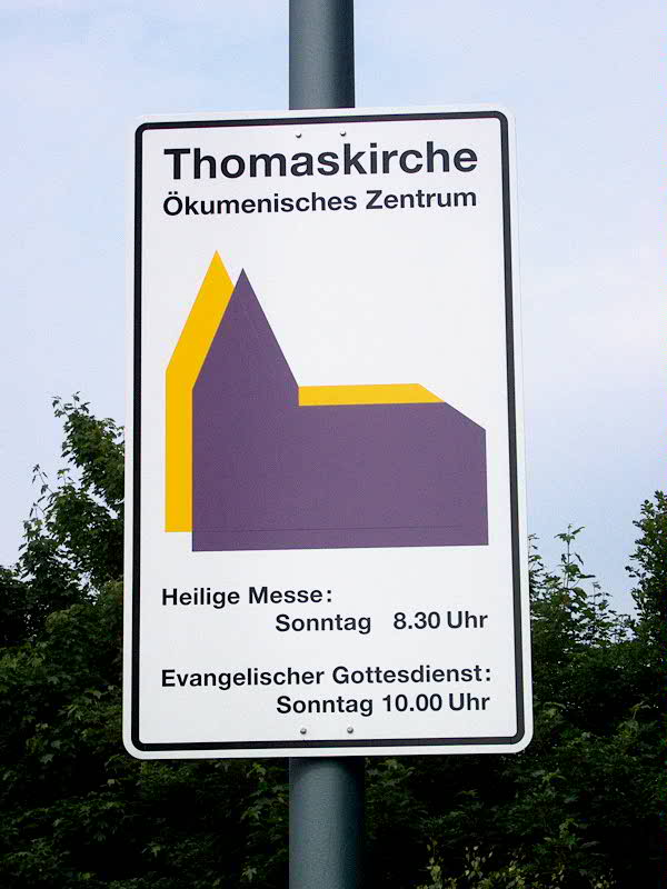 Hinweisschild zum Ökumenischen Zentrum Thomaskirche in Marburg